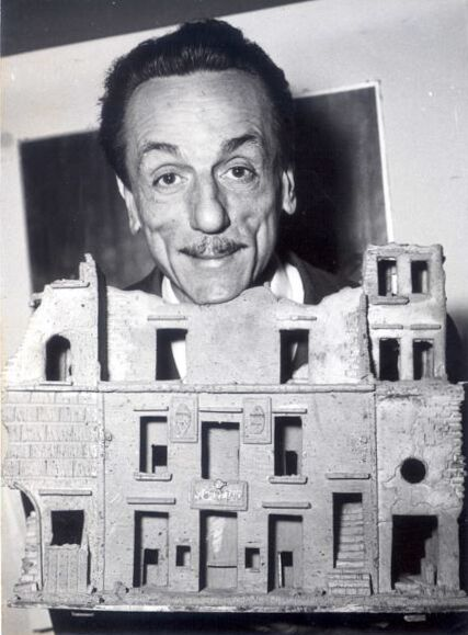 Eduardo De Filippo con il sughero del Teatro S. Carlino (1955)